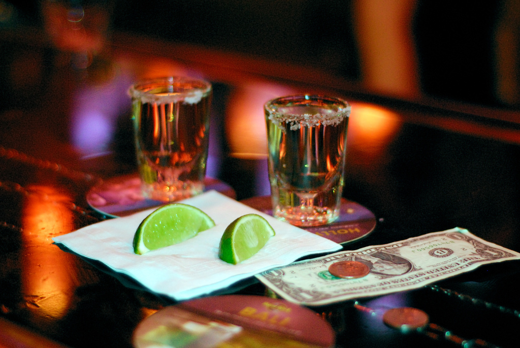 En Estados Unidos casi todo es más grande, incluso los chupitos, que son como el doble o el triple de los de España (y también mucho más caros).